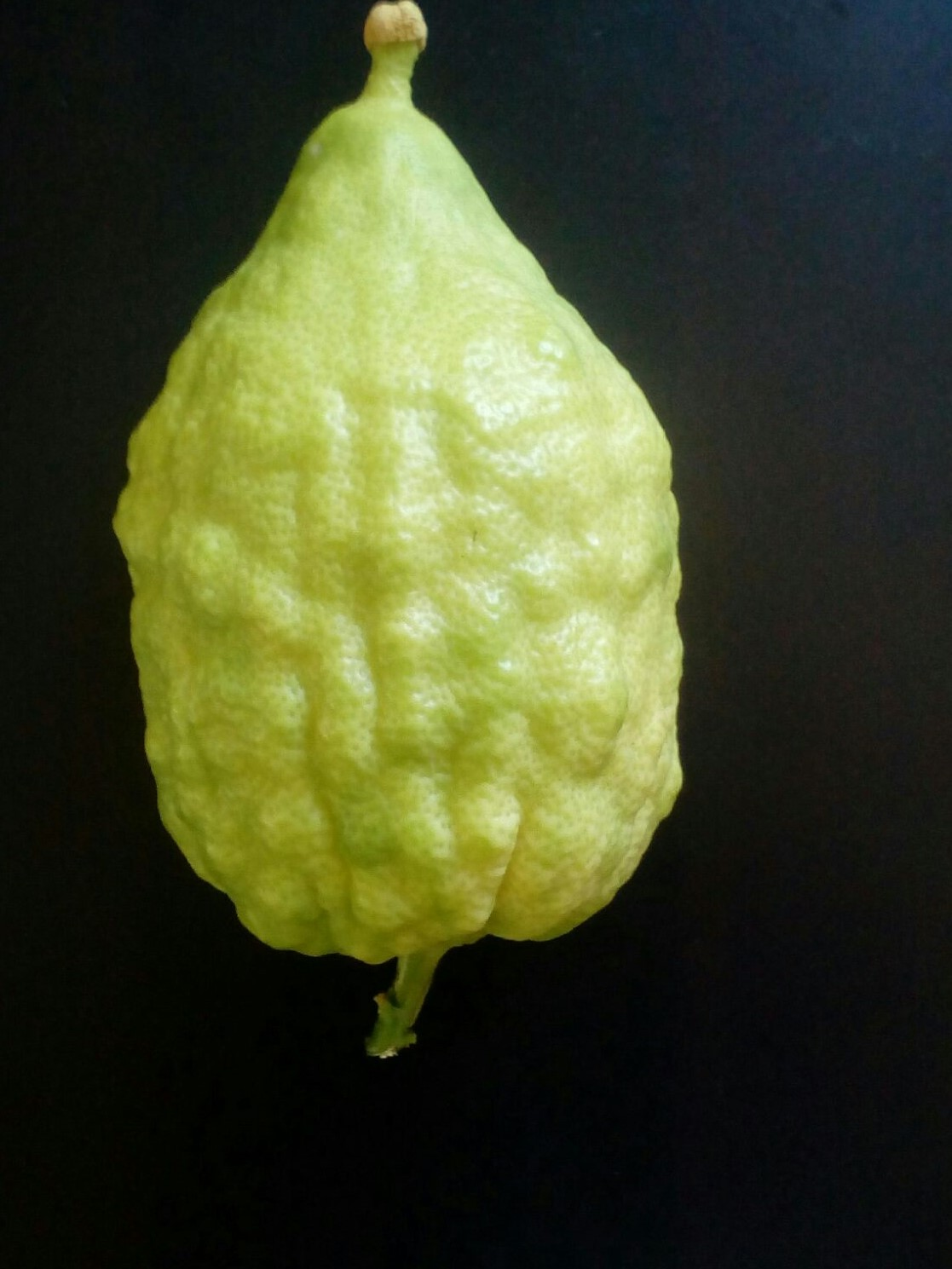 מבנה האתרוג, הכולל את העוקץ (בתחתית האתרוג) גופו של האתרוג, חוטמו, הפיטם שעליו ובראשו השושנתא.